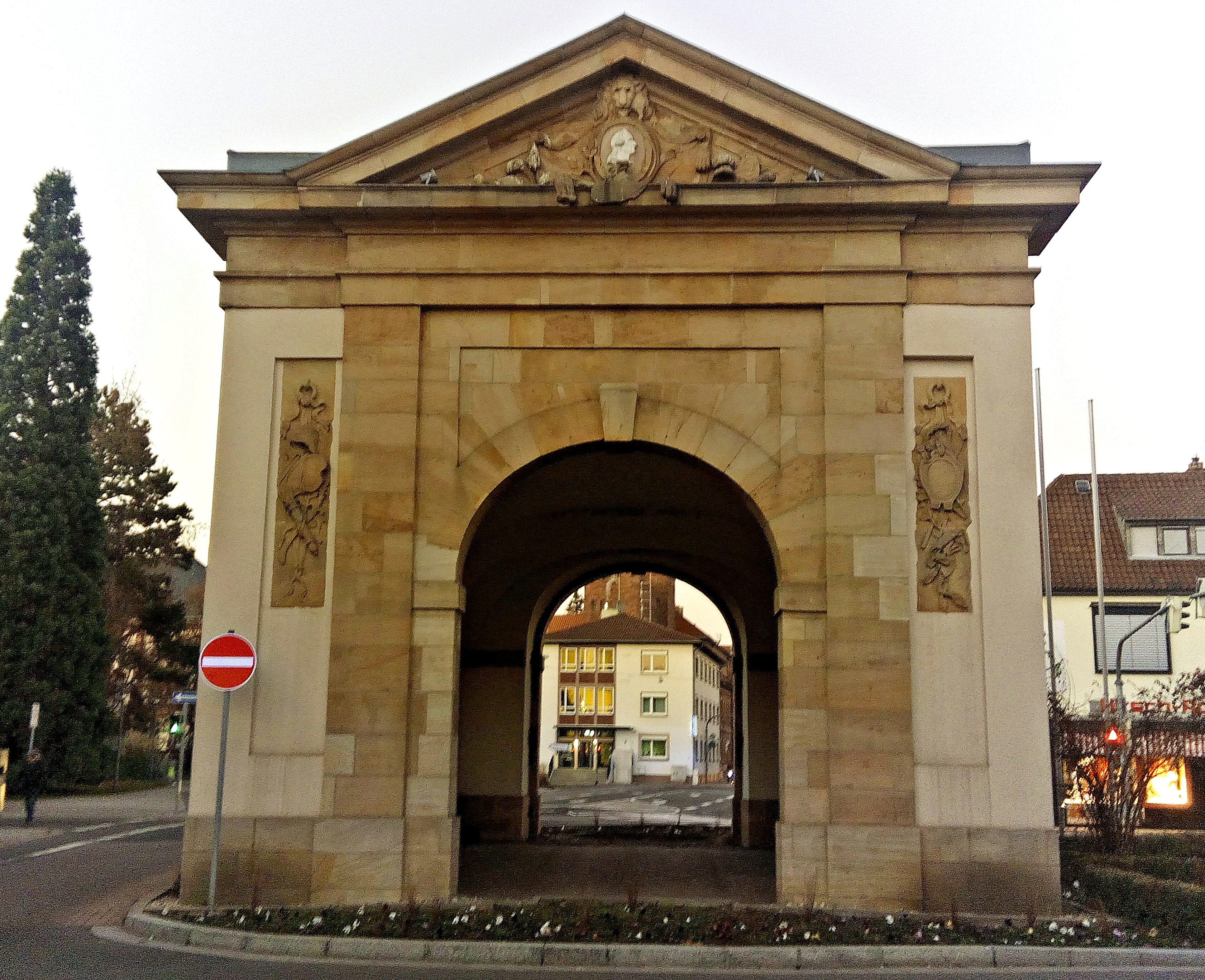 Frankenthal, Wormser Tor, Stadtseite